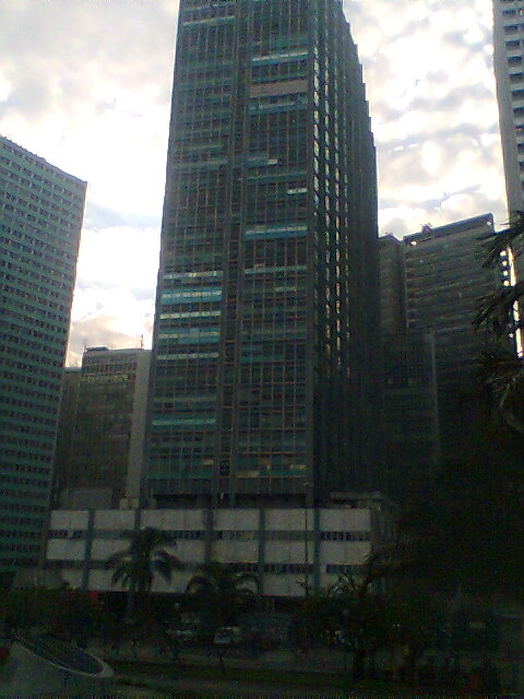 Edifício Avenida Central.